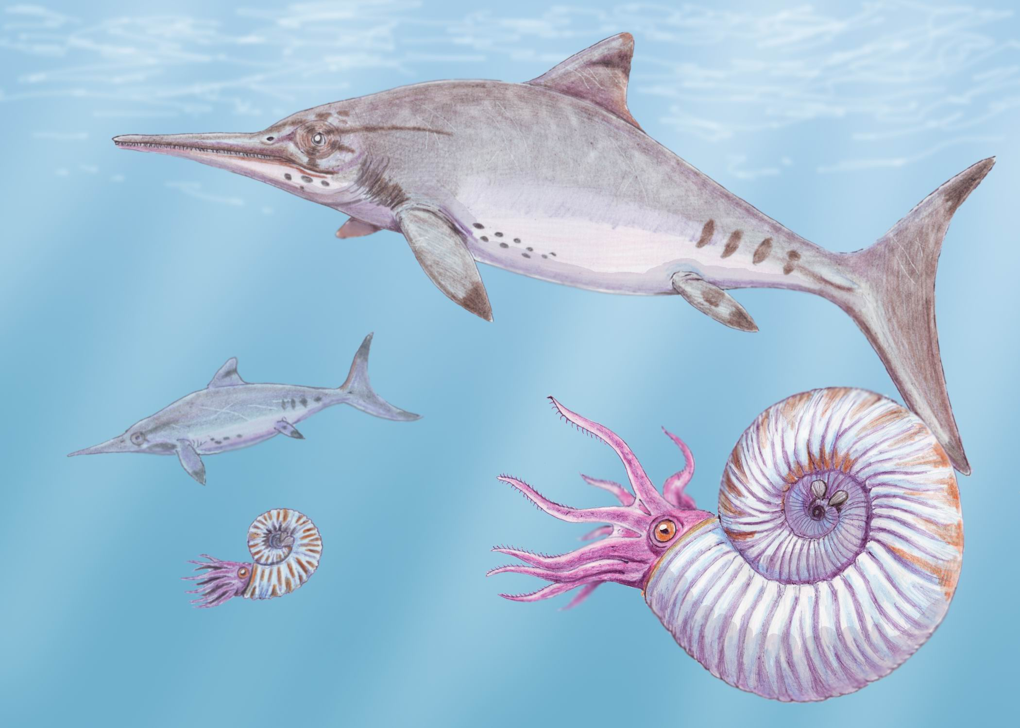 Nannopterygius yasikovi (originally Yasykovia)